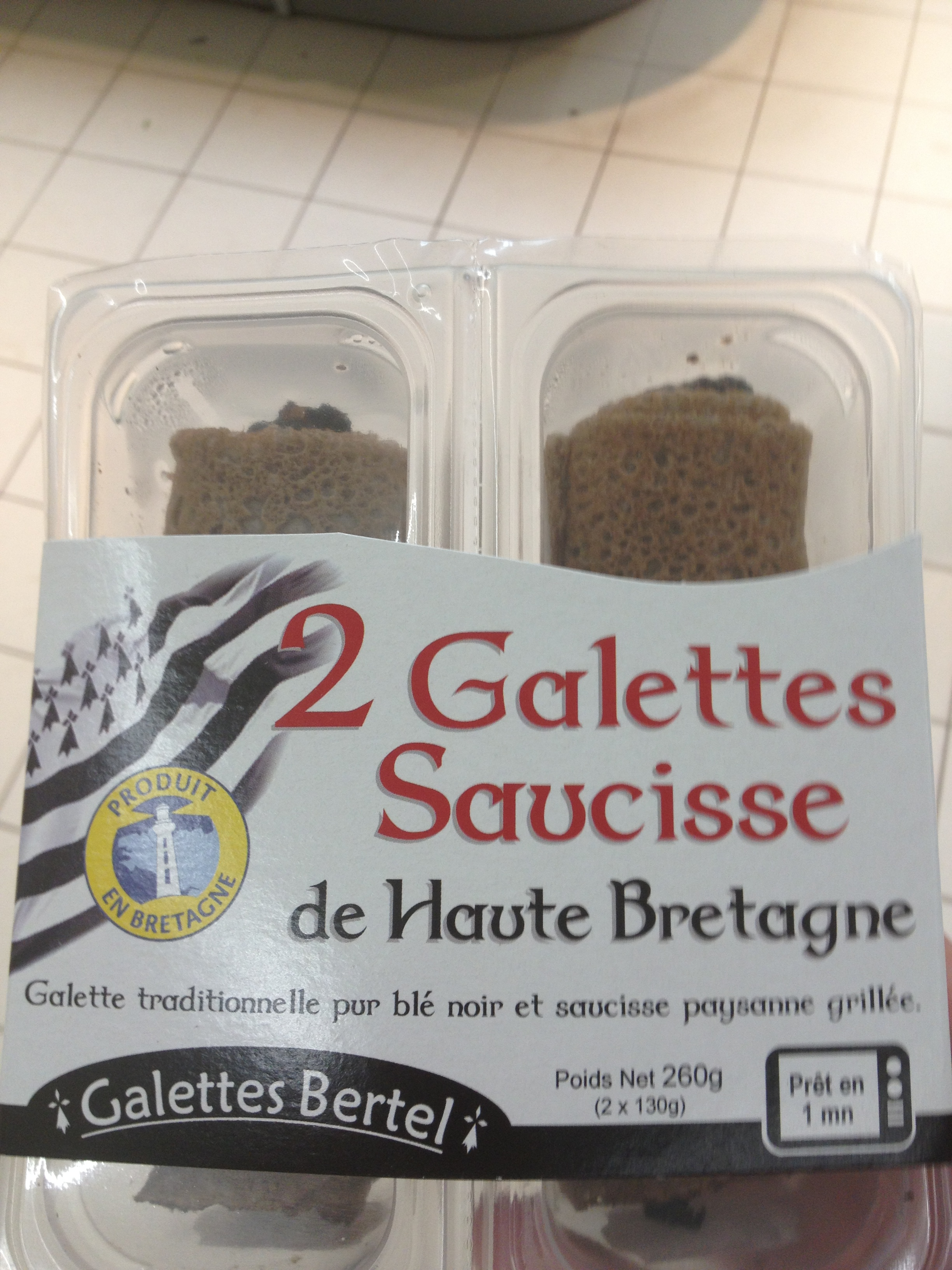 Galette-saucisse commercialisée dans un supermarché de La Chapelle-des-Fougeretz sous la forme de snacking.